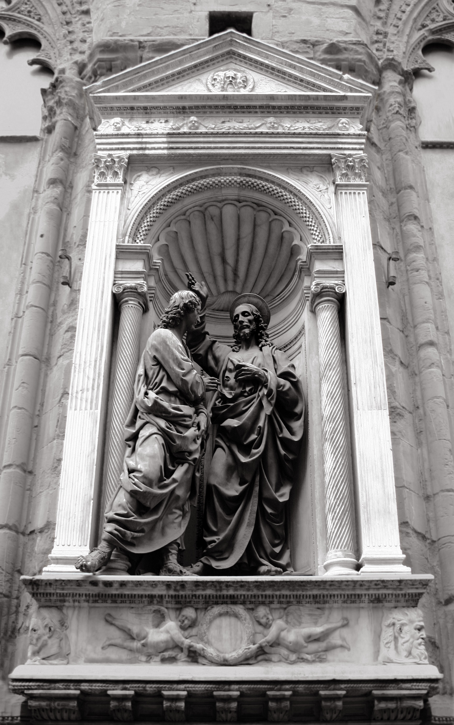 Firenze, Orsanmichele. Tabernacolo dell'arte della Mercatanzia, con San Tommaso